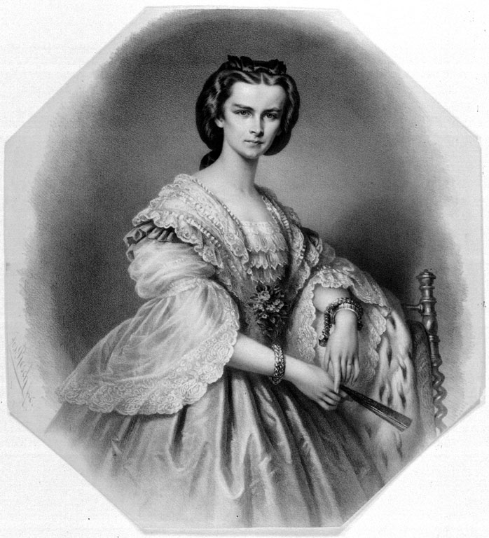 Bavorská princezna a kněžna Thurn-Taxis, sestra Alžběty Bavorské